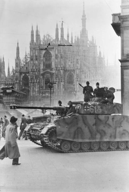 Zentralbild, II. Weltkrieg 1939-1945 An der Front in Italien, September 1943 Panzer der Leibstandarte "Adolf Hitler" besetzen nach Bekanntwerden des Waffenstillstandsvertrages der Badoglio-Regierung mit den Westmächten am 8.9. die Stadt Mailand. UBz: die Panzer vor dem Mailänder Dom. SS-PK-Kriegsberichter Rottensteiner. Scherl Bilderdienst Information added by Wikimedia users.